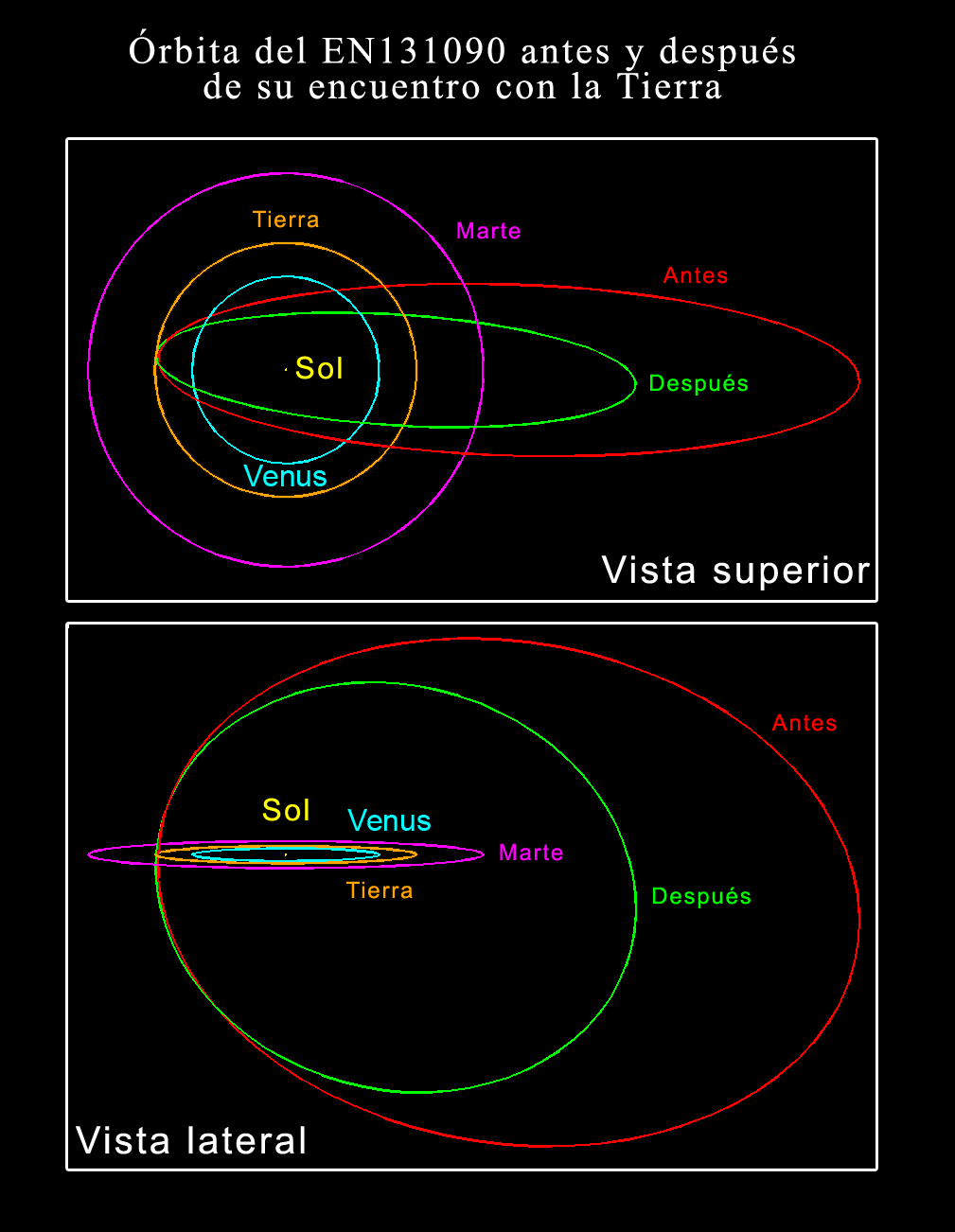 Órbita del asteroide antes y despiés de su acercamiento a la Tierra